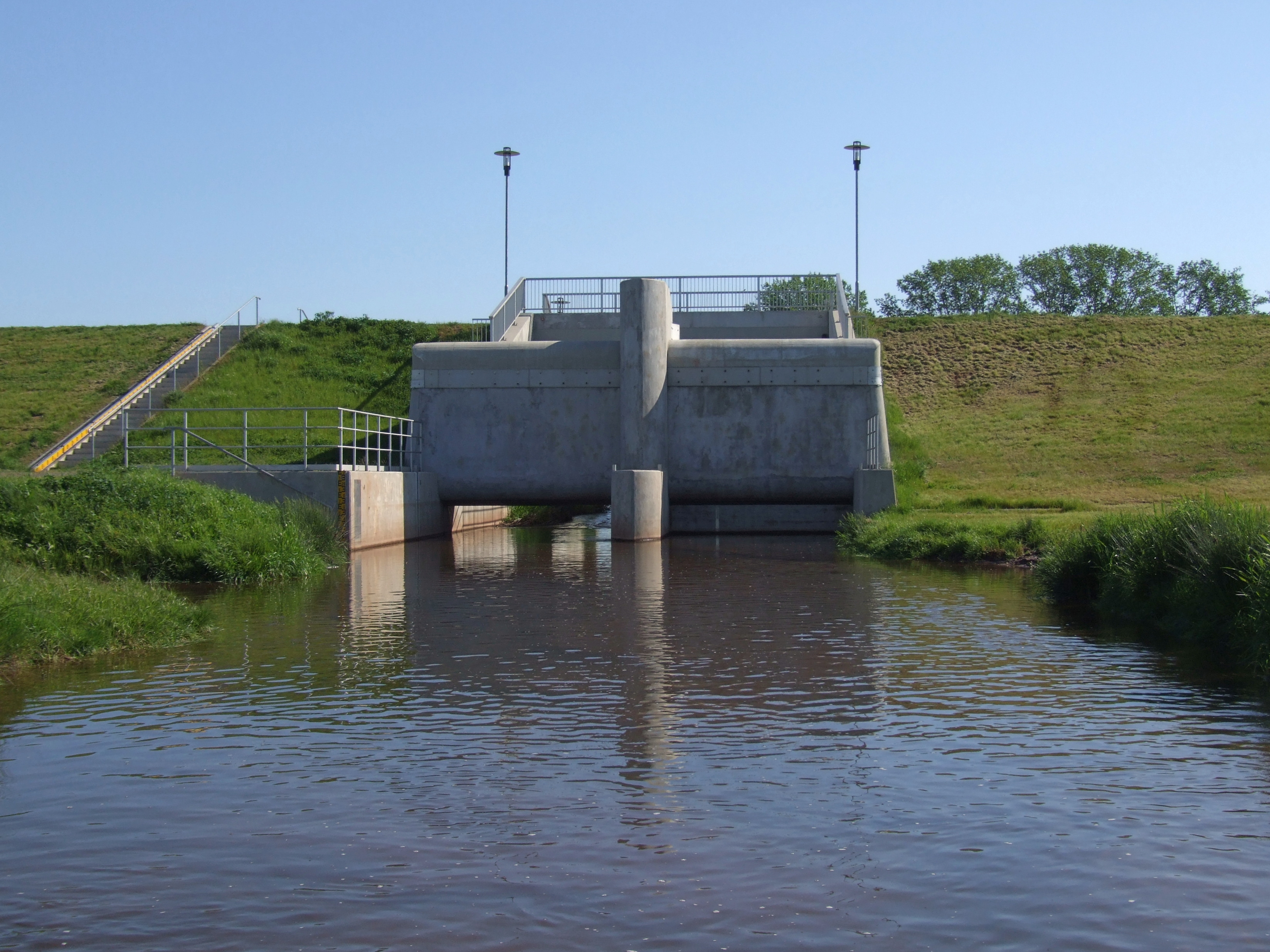 Das Hochwasserrückhaltebecken in Erftstadt Niederberg. Eine Ansicht von der angestauten Seite aus zum betonierten (Überlauf)Teil hin